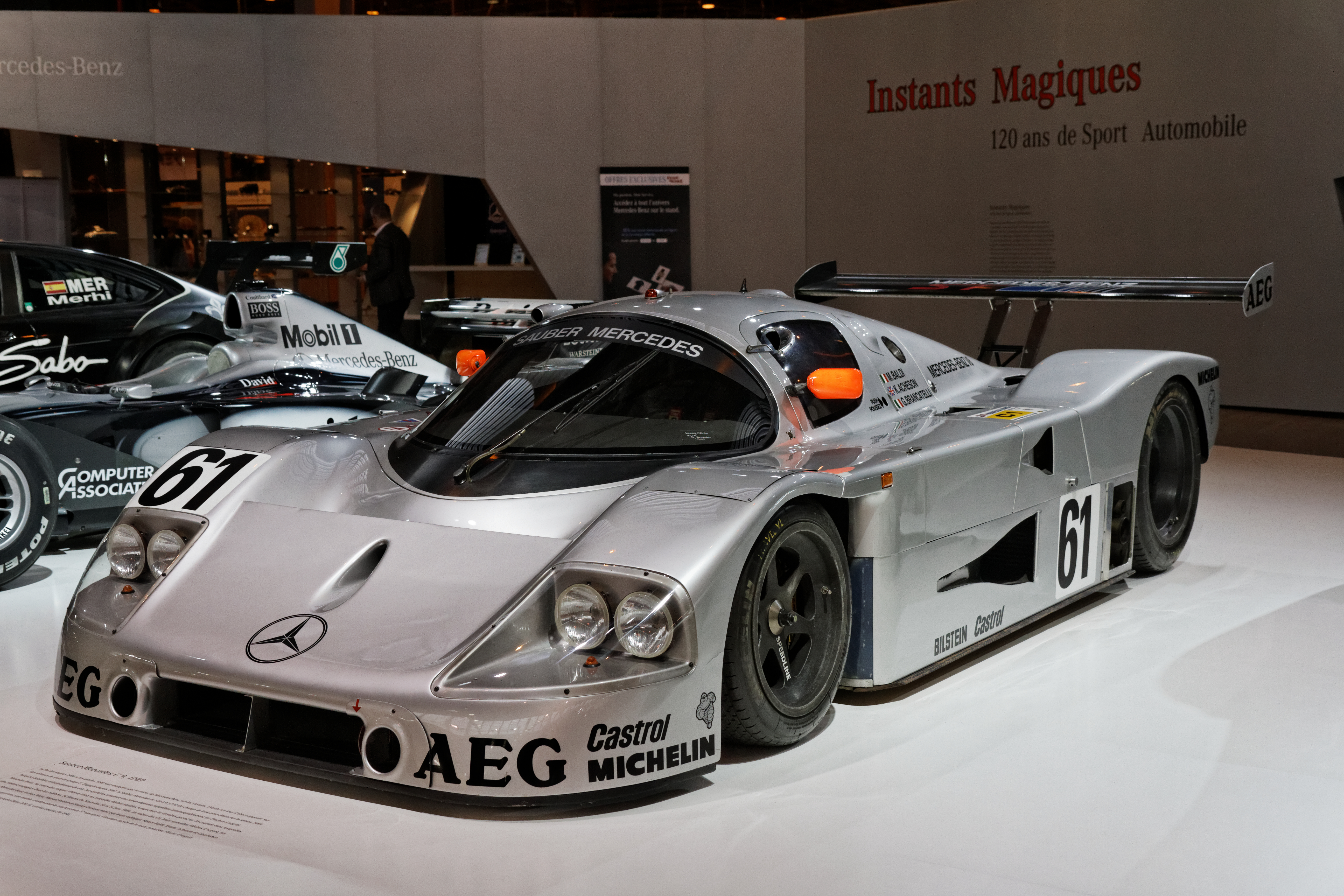 Une Sauber-Mercedes C9 exposée lors du salon Retromobile 2014.